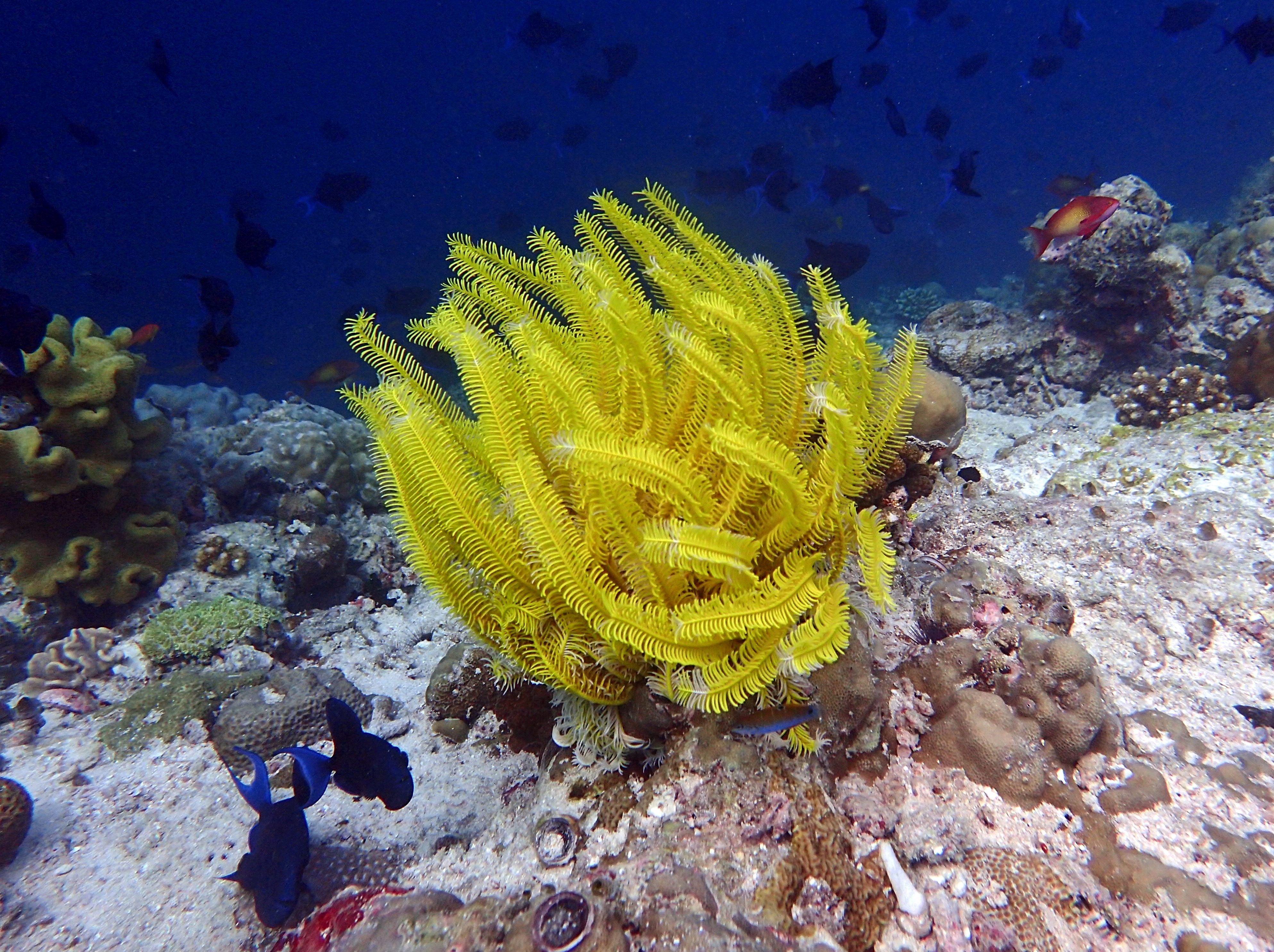 Une comatule noble (Comaster schlegelii) aux Maldives (atoll de Baa).